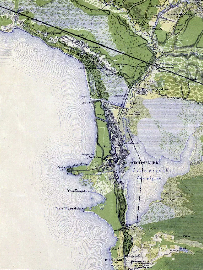 фотография карты Сестрорецка середины 19 века (примерно с 1811 по 1864) с границами княжества Финляндского и России по нынешней Тарховской улице.